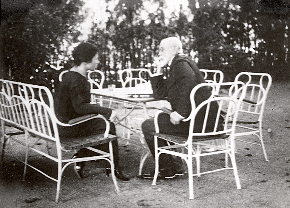 Vlasta Kalalova a TGM